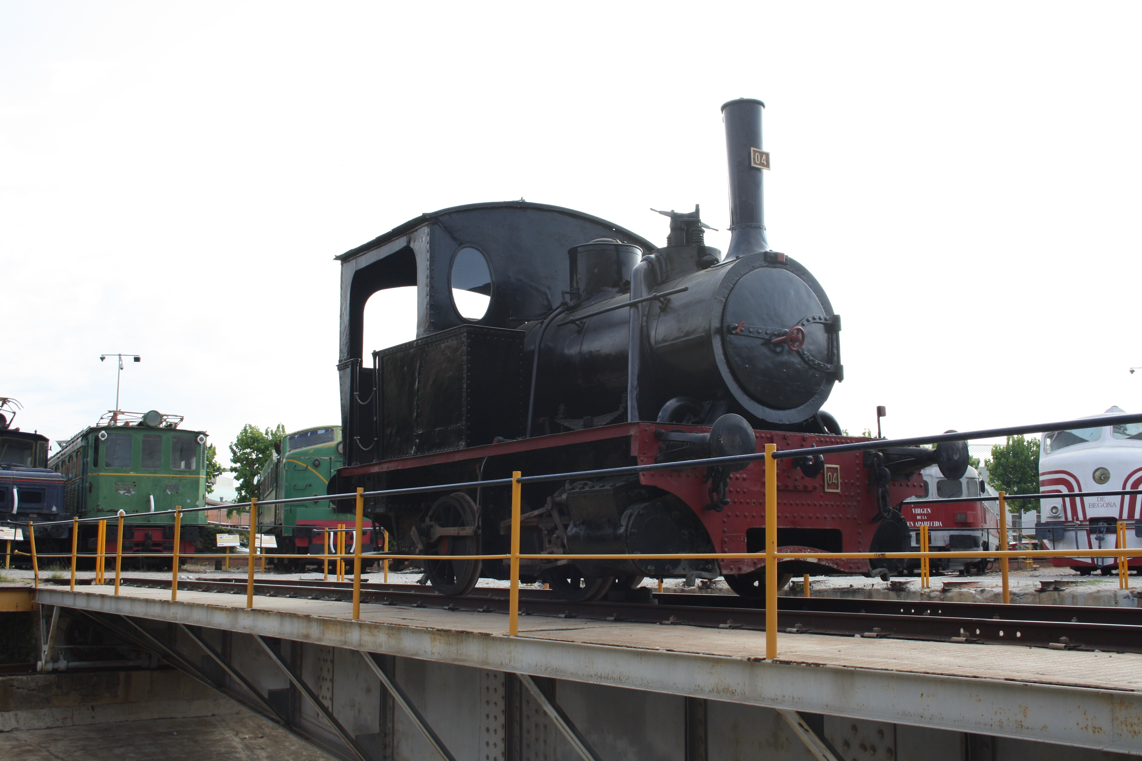 Locomotora 020-04 Andaluces